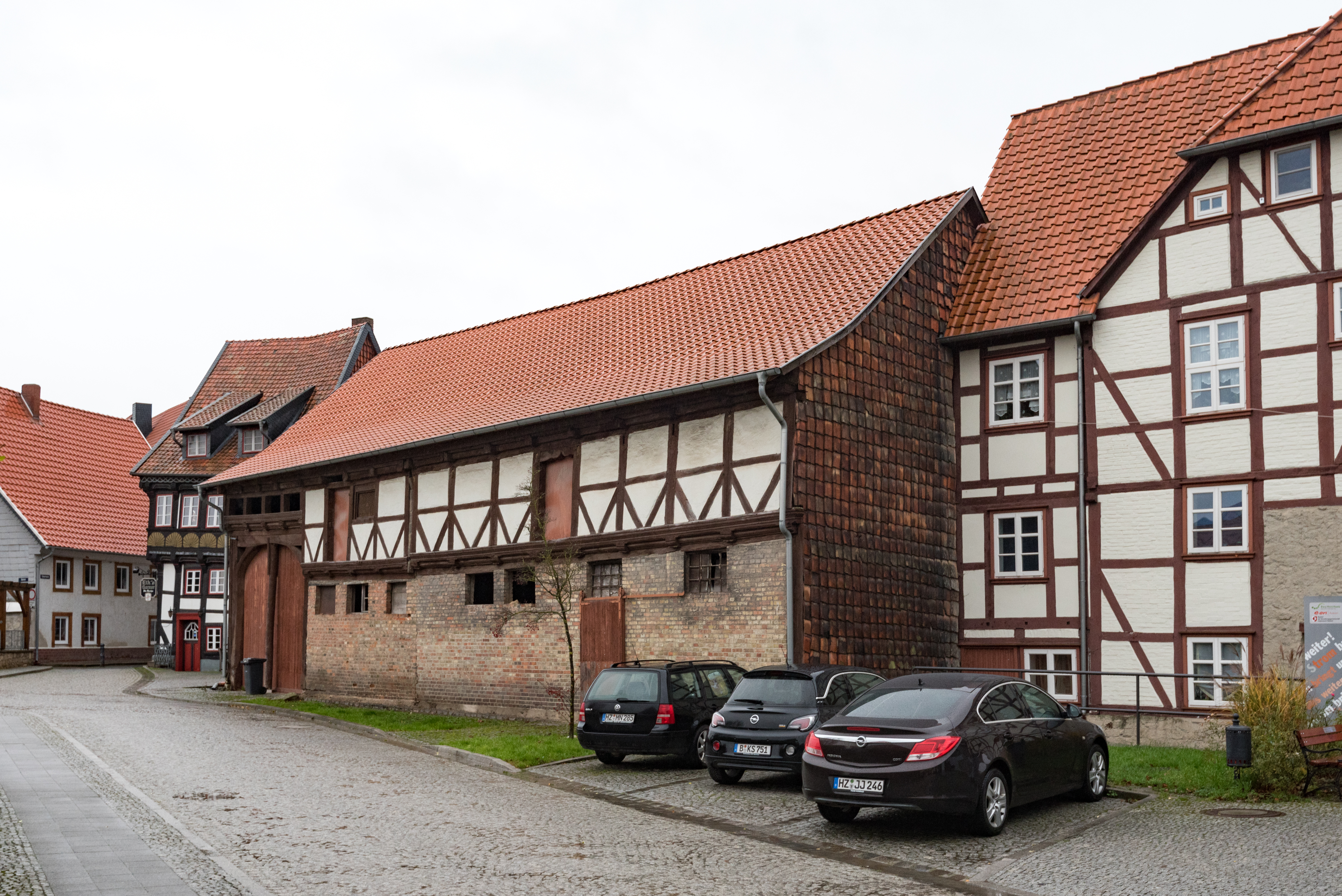 Osterwieck, Stobenplatz, Scheune